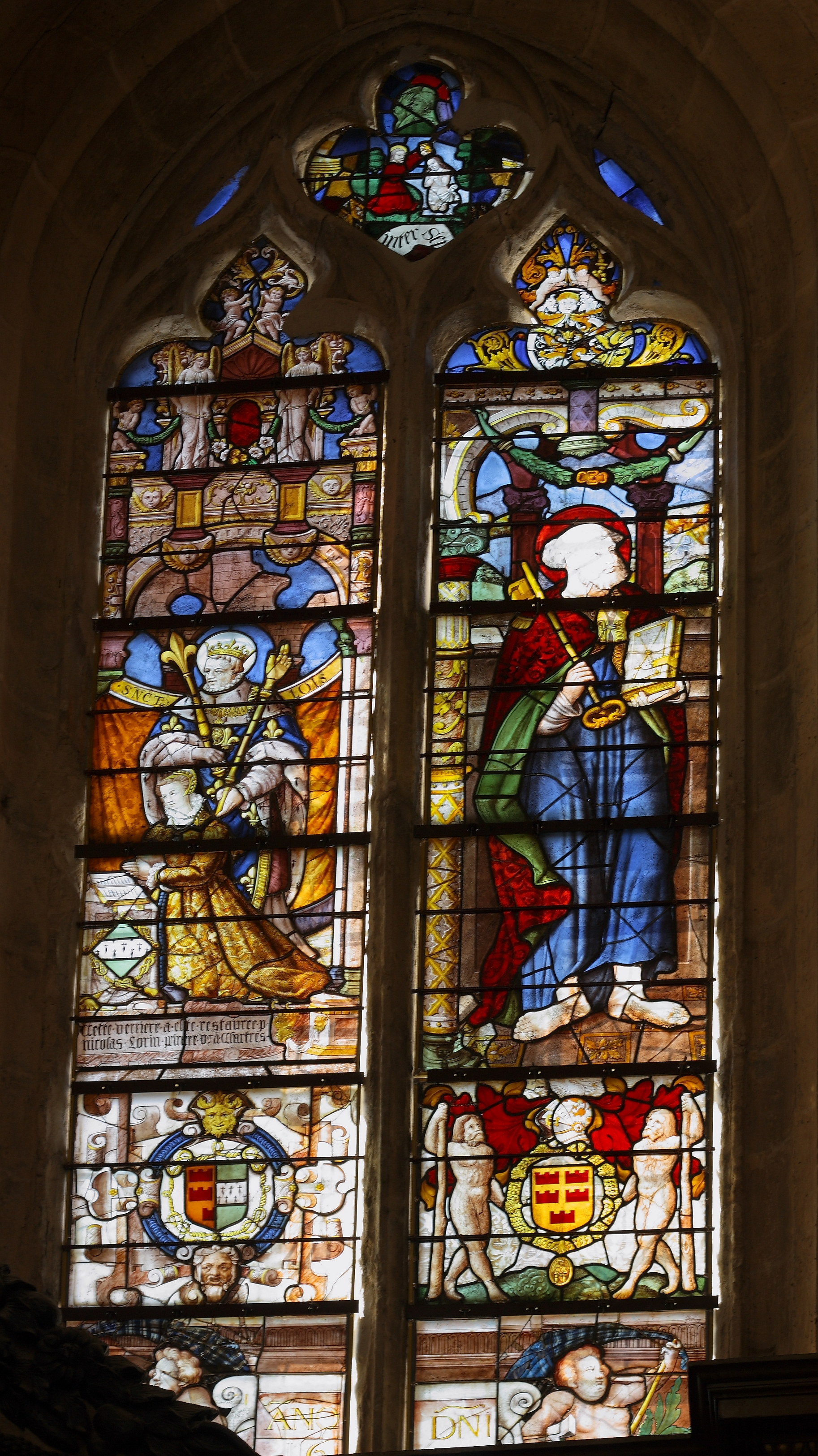 Kirche Saint-Cyr-et-Sainte-Julitte in Crouy-sur-Ourcq (Département Seine-et-Marne), im 16./17. Jahrhundert erbaut, Bleiglasfenster im Chor von 1615 mit der Darstellung des französischen Königs Ludwig des Heiligen und Louise d'Ougnyès (links) und des Apostels Petrus (rechts), restauriert im 19. Jahrhundert von Nicolas Lorin